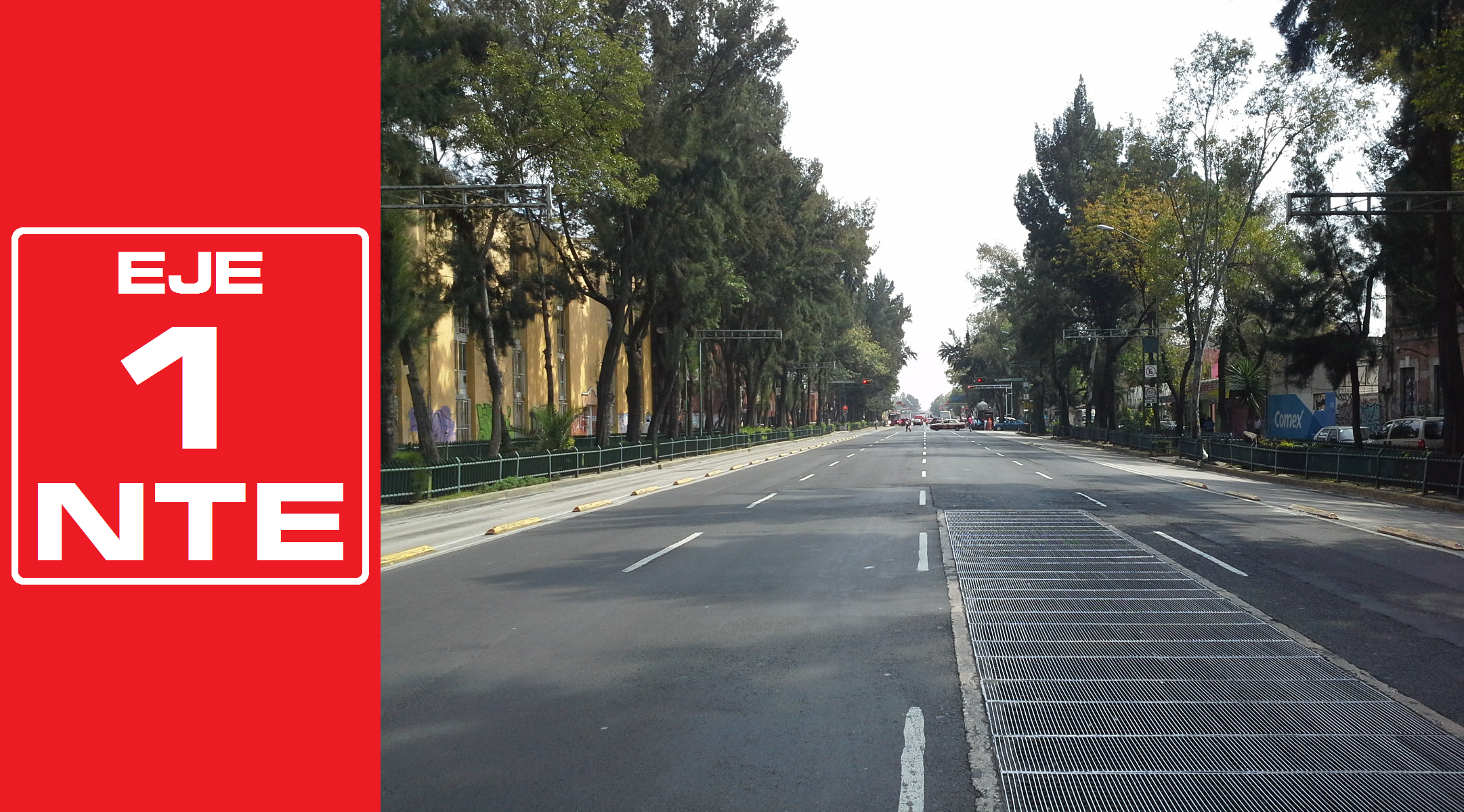 Rediseñado original de la señalética de los Ejes viales de la Ciudad de México por José García (Wiki ID: narumiyama)